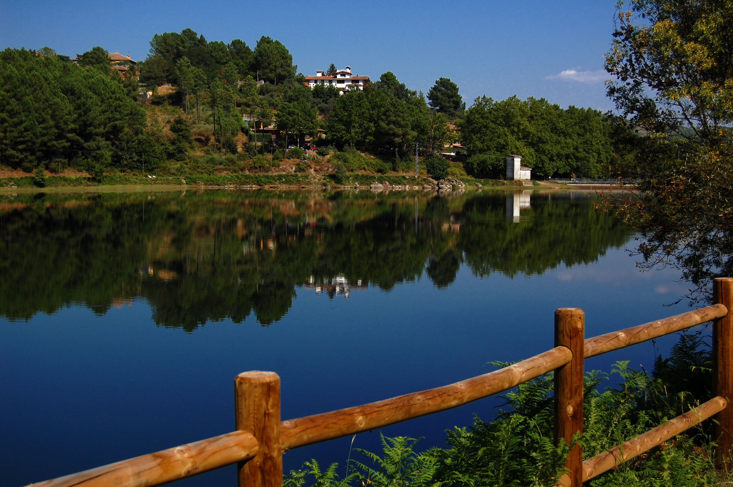 Vista del embalse de Arenas de San Pedro (Ávila, España)